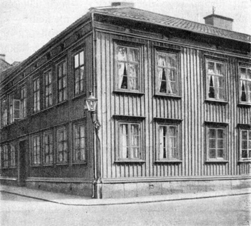 Haga Östergata 17, Göteborg.